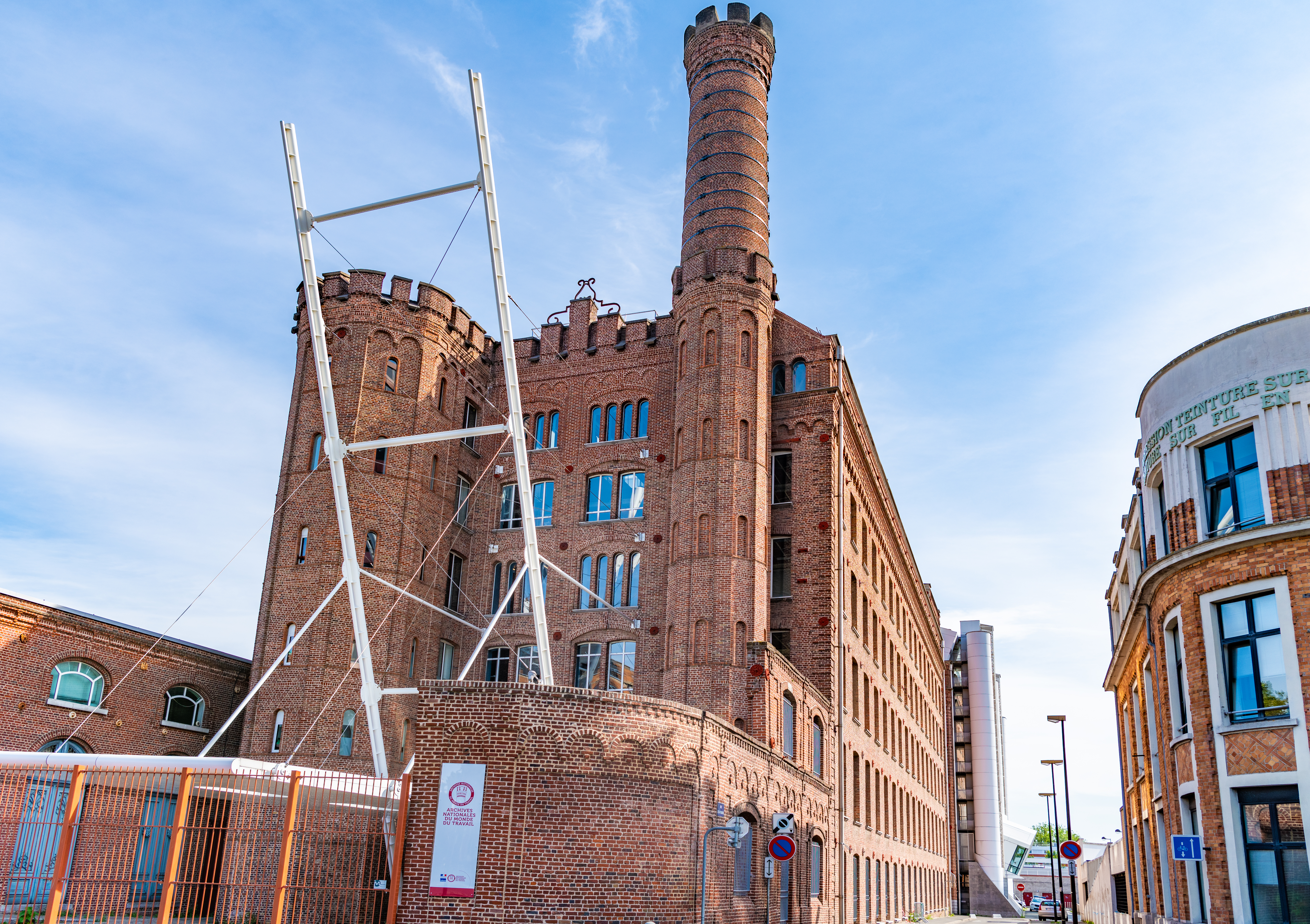 Le batiment des Archives Nationales du Monde du Travail dans le quartier du centre. Batiment historique. Patrimoine. Architecture. Archives.